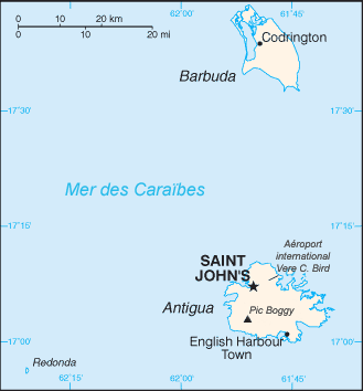 Carte d'Antigua-et-Barbuda Source : CIA World Factbook (traduite) Historique de la carte originale (suppr) (actu) 14 février 2005 à 14:36 . . Jim2k . . 330x355 (9150 octets) (issue de wiki)